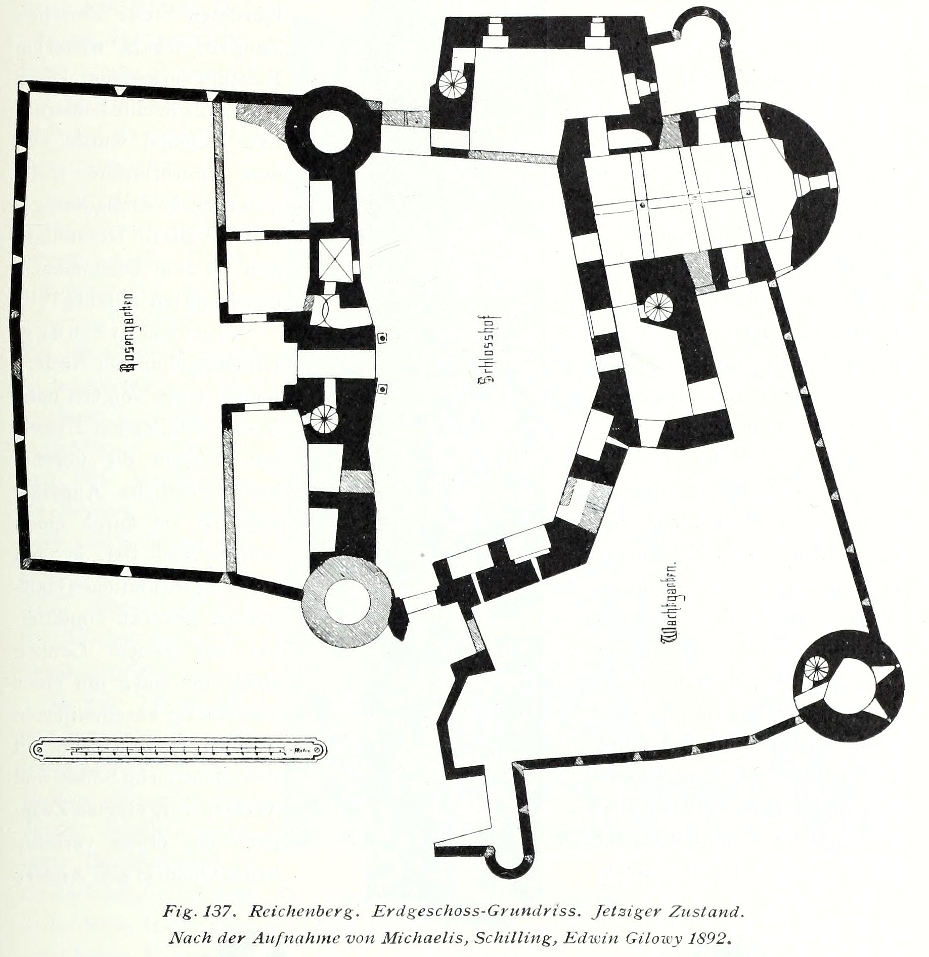 Erdgeschoss Grundriss Jetziger Zustand Nach Aufnahme von Michaelis Schilling Edwin Gilowy 1892